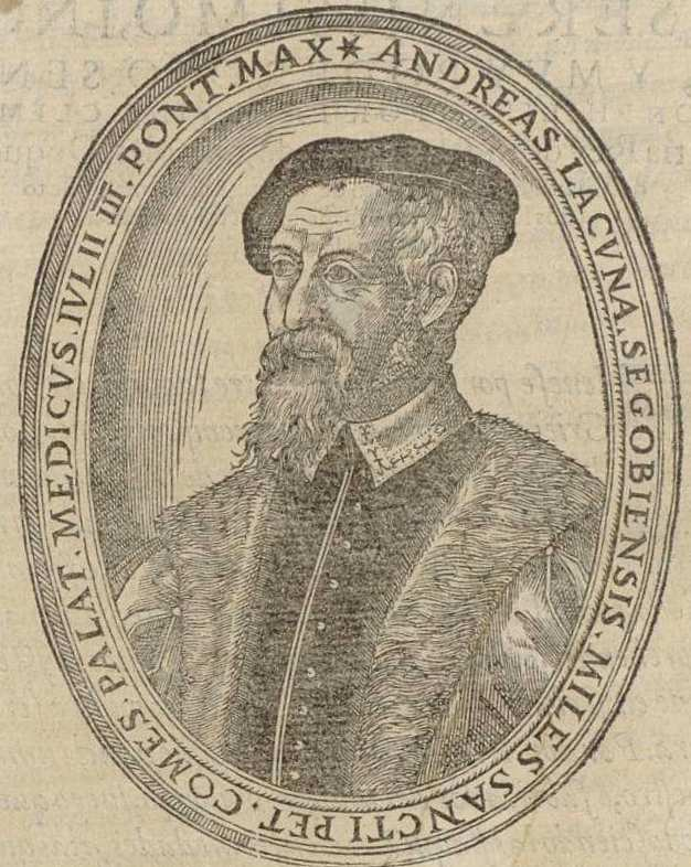 Retrato de Andrés Laguna publicado en su traducción anotada de Dioscórides: "Acerca de la materia medicinal y de los venenos mortíferos Pedacio Dioscorides anazarbeo ; traduzido de lengua griega en la vulgar castellana...", en Salamanca, por Mathias Gast, 1570